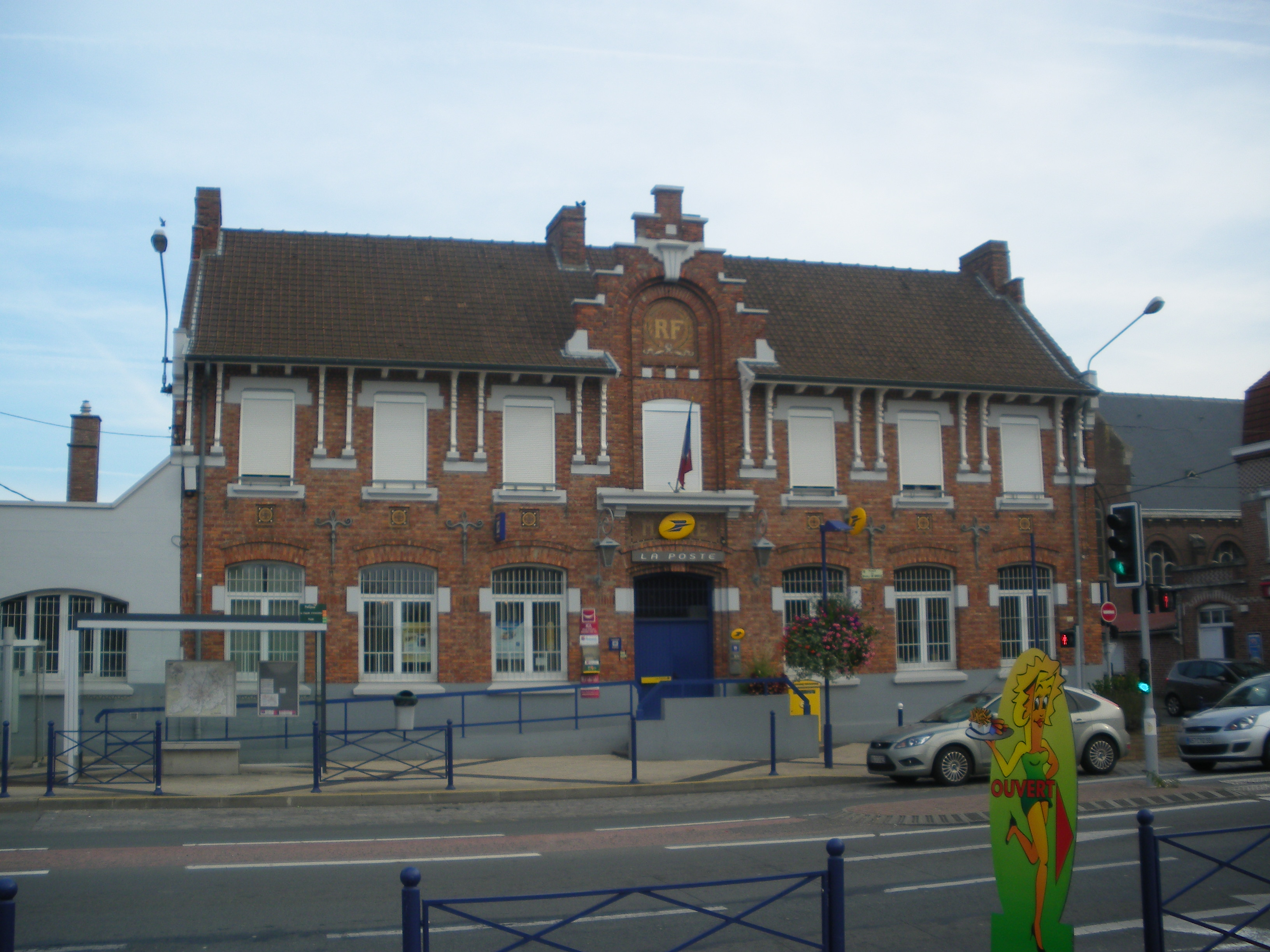 Ancienne mairie de La Chapelle-d'Armentières, devenue la Poste.